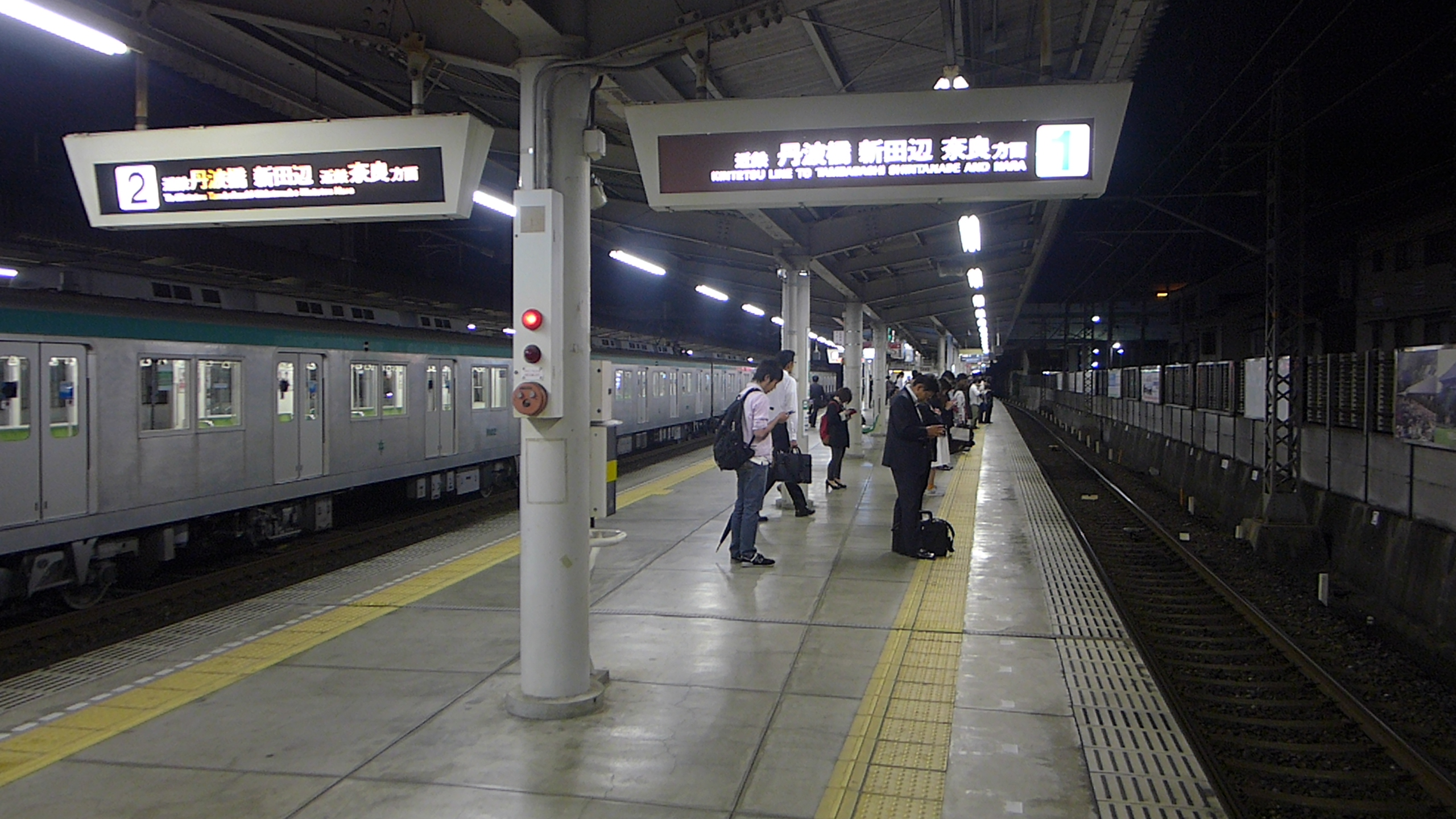 近鉄京都線と京都市交地下鉄烏丸線の接続駅、竹田駅。丹波橋・新田辺・西大寺方面。番線案内には2線とも近鉄の駅が記載されているが、駅を管理している京都市交の仕様になっている